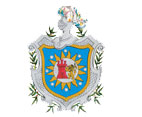 Logo de La UNAN Leon hecho por mi